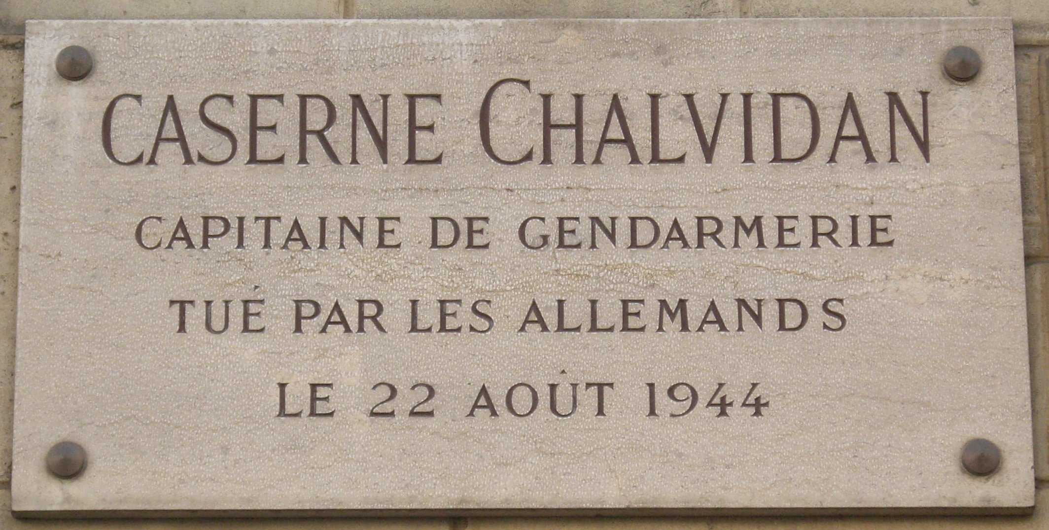 Plaque commémorative, caserne de gendarmerie, 51 boulevard Excelmans, Paris 16e. « Caserne Chalvidan. Capitaine de gendarmerie tué par les Allemands le 22 août 1944. »Note: Jean Chalvidan (1912-1944), commandant FFI de l'arrondissement Paris-Exelmans en juillet-août 1944.